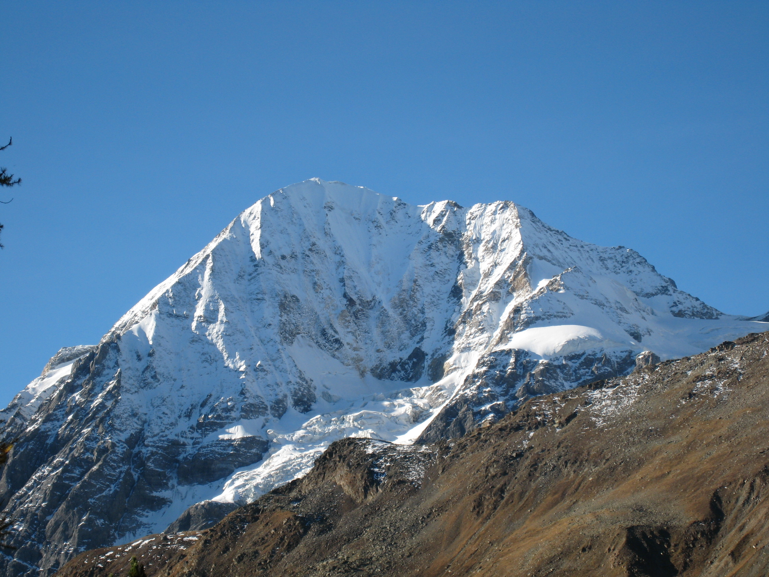 Die Königsspitze, Teil der Ortlergruppe, von der gegenüberliegenden Seite dieses Berges aus gesehen